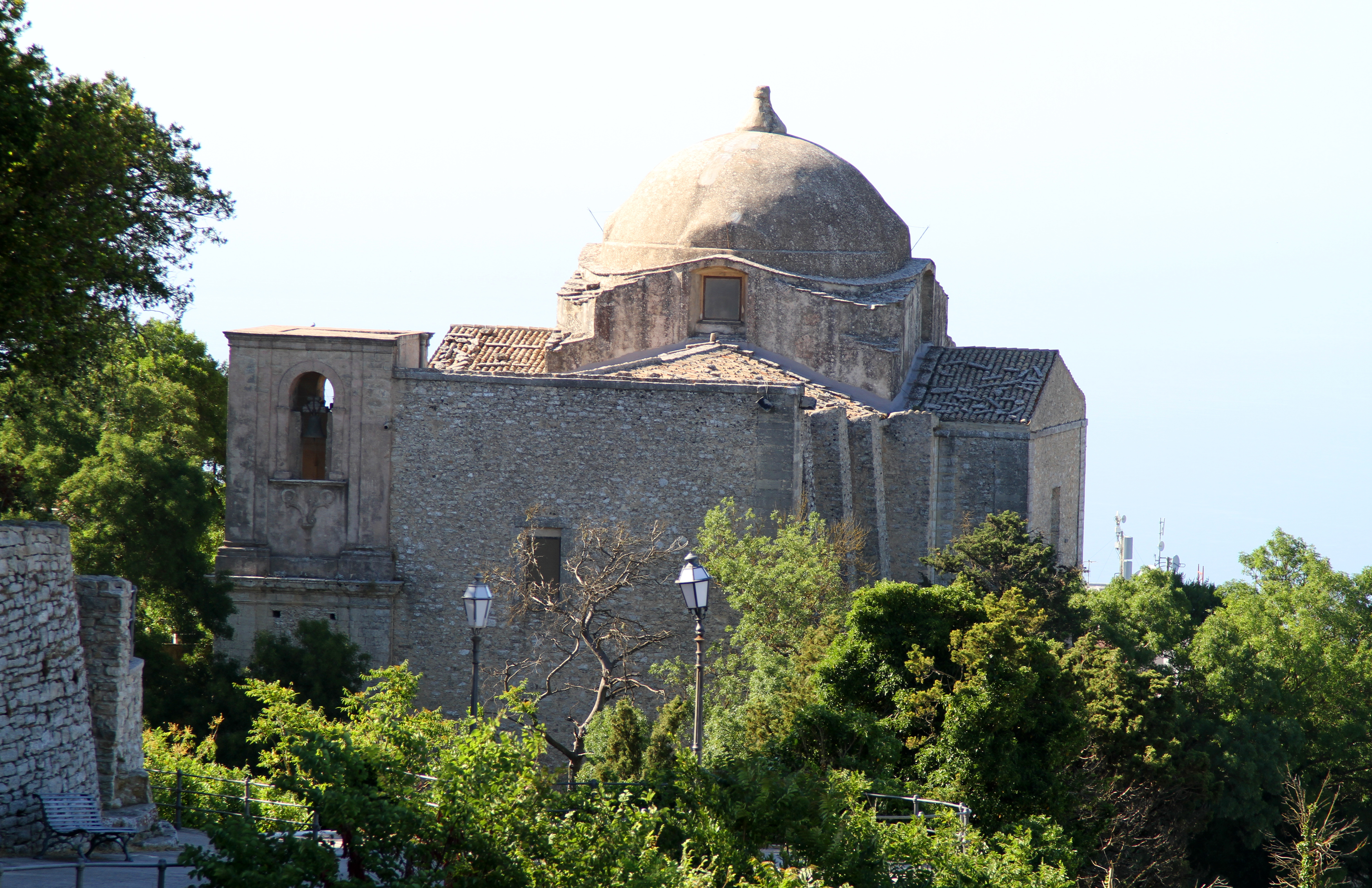 Chiesetta di Erice